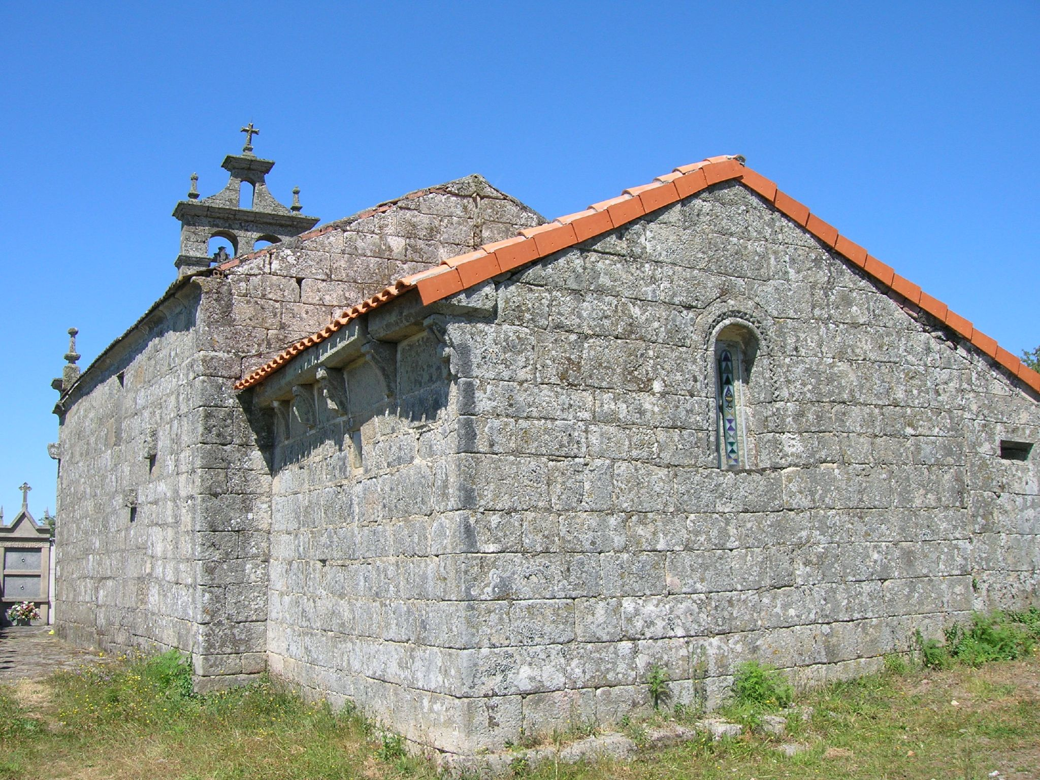 Iglesia de Santa María de Perrelos - Sarreaus - Ourense